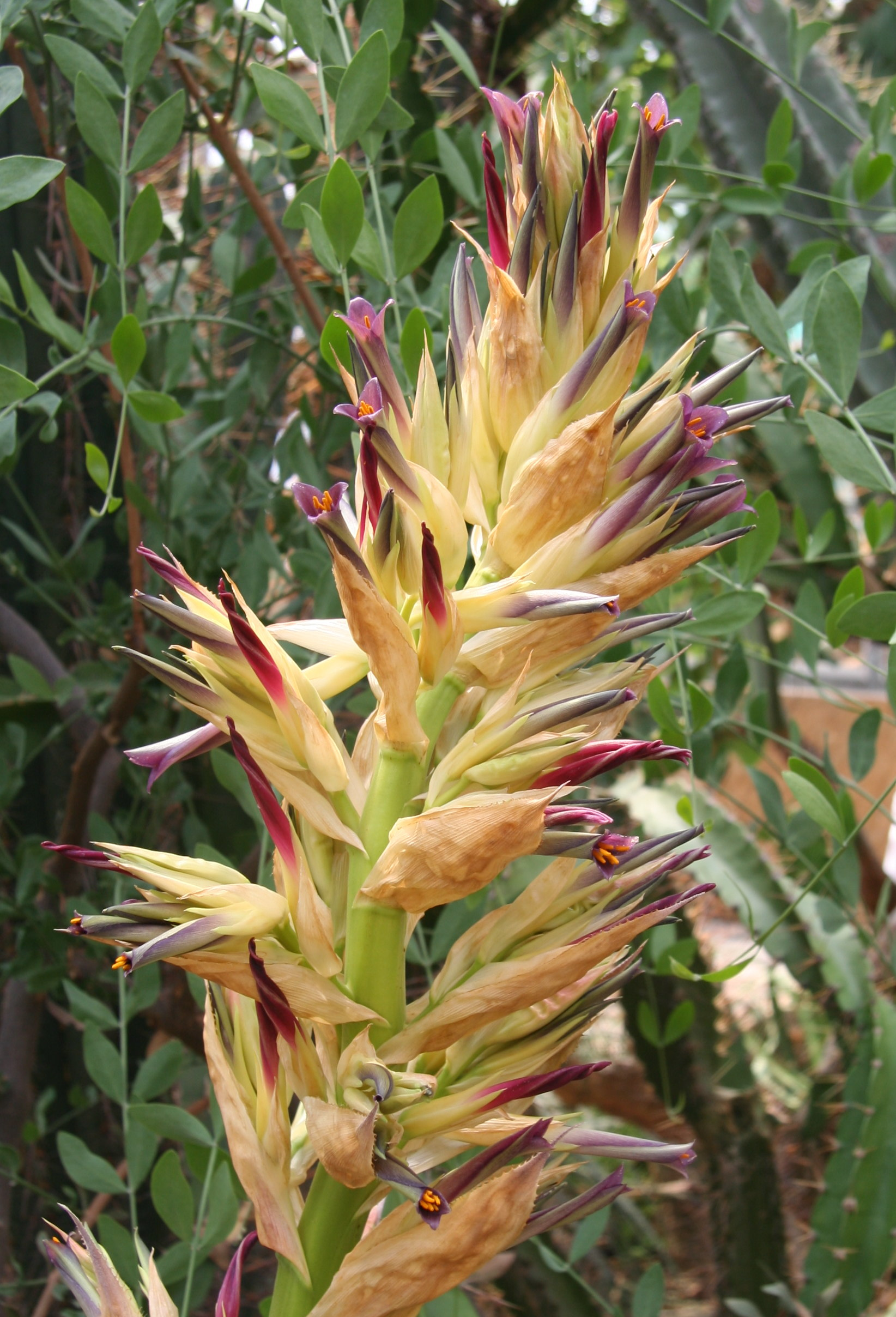 Puya glabrescens im Botanischen Garten Dresden